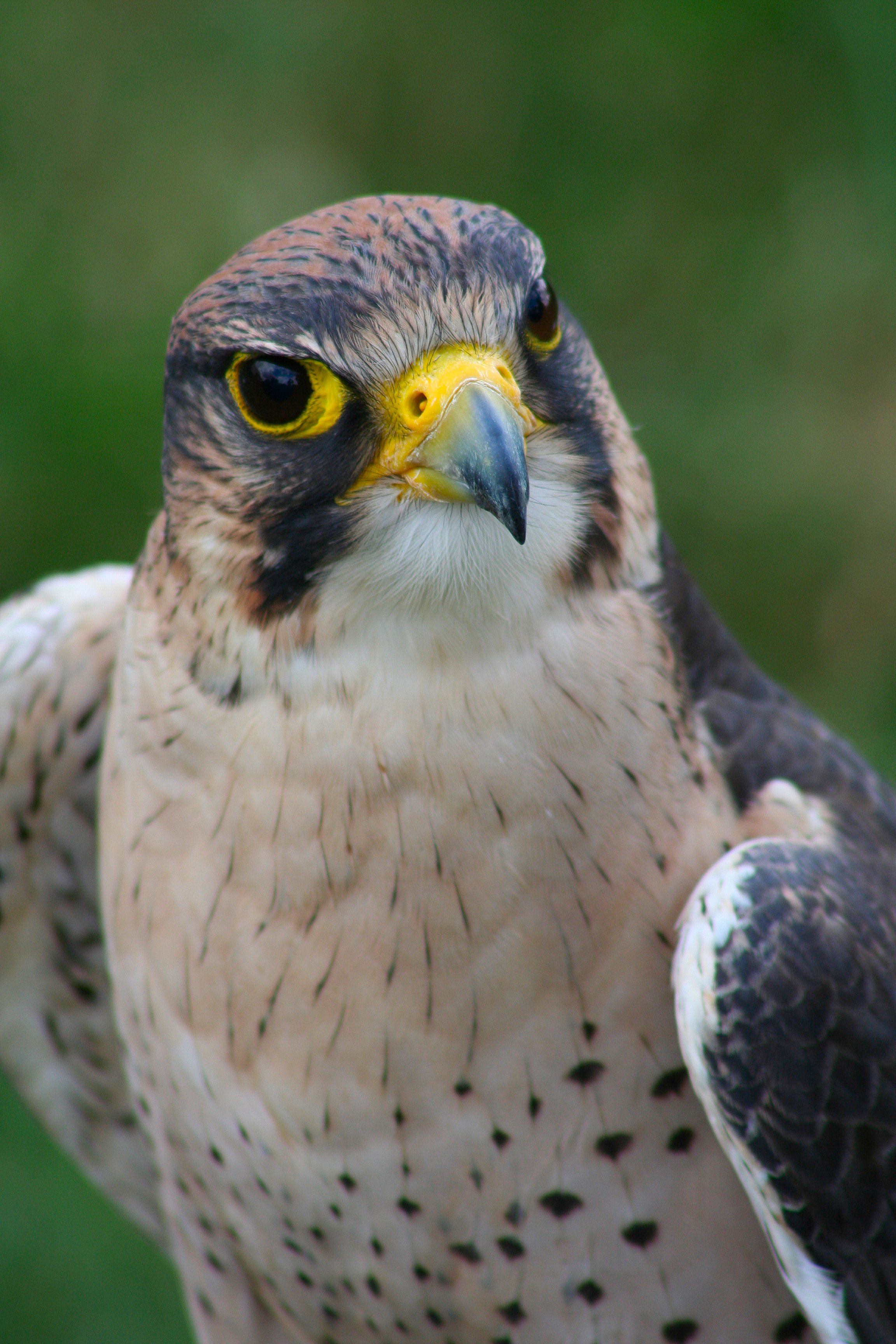 A domestic Lanner Falcon (Falco biarmicus)